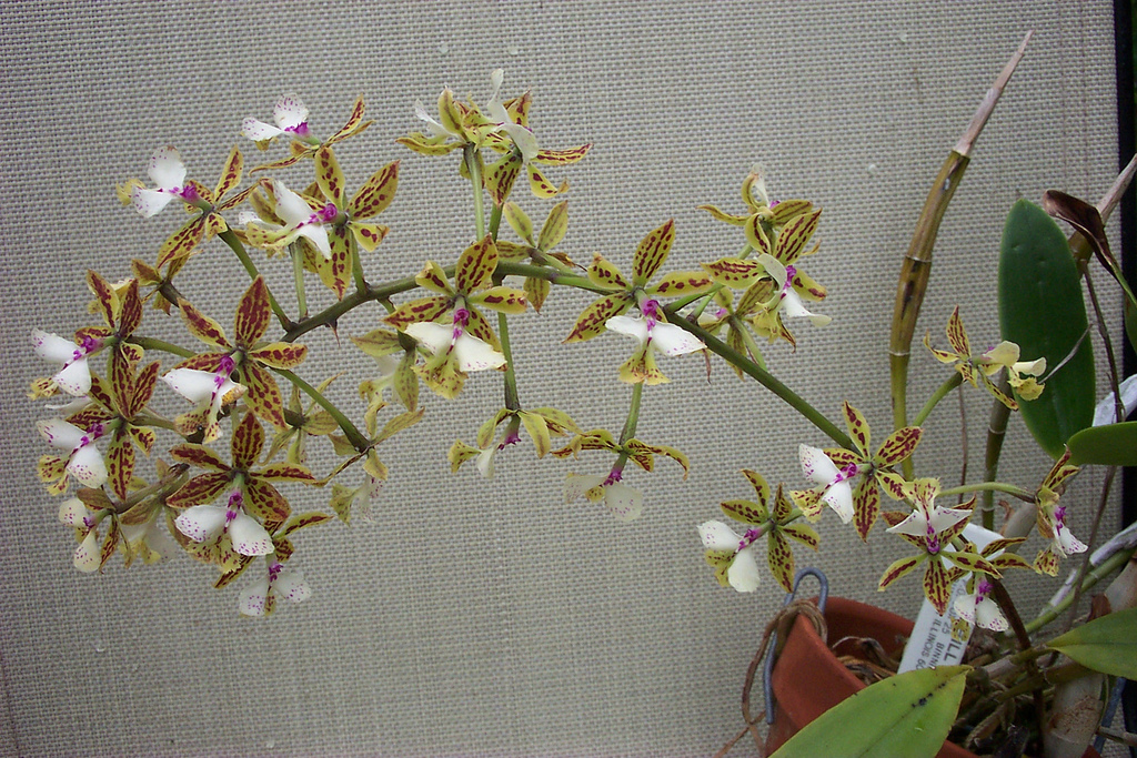 Epidendrum stamfordianum - inflorescence